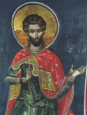 Мч. Уар. Тзортзи (Зорзис) Фука. Фреска. Афон (Дионисиат). 1547 г.